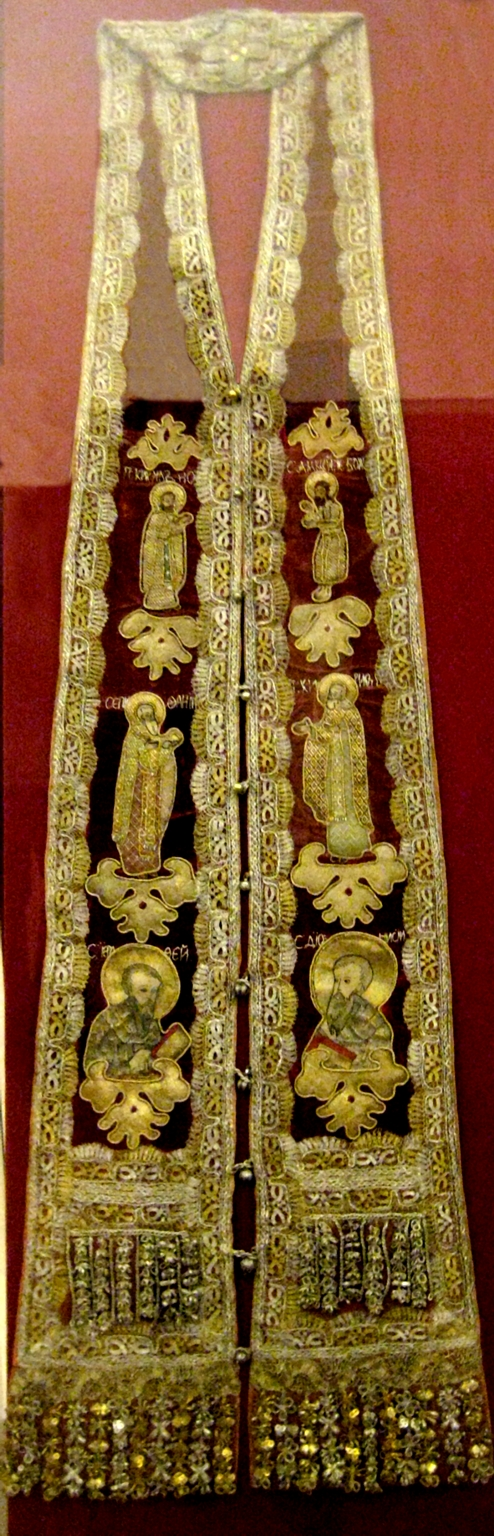 epitrachelion. Епитрахиль. 19 век. Шитые изображения святых - начало 16 века. Реставрирована ВХНРЦ им. Грабаря И.В. Михайловой, 2005 год